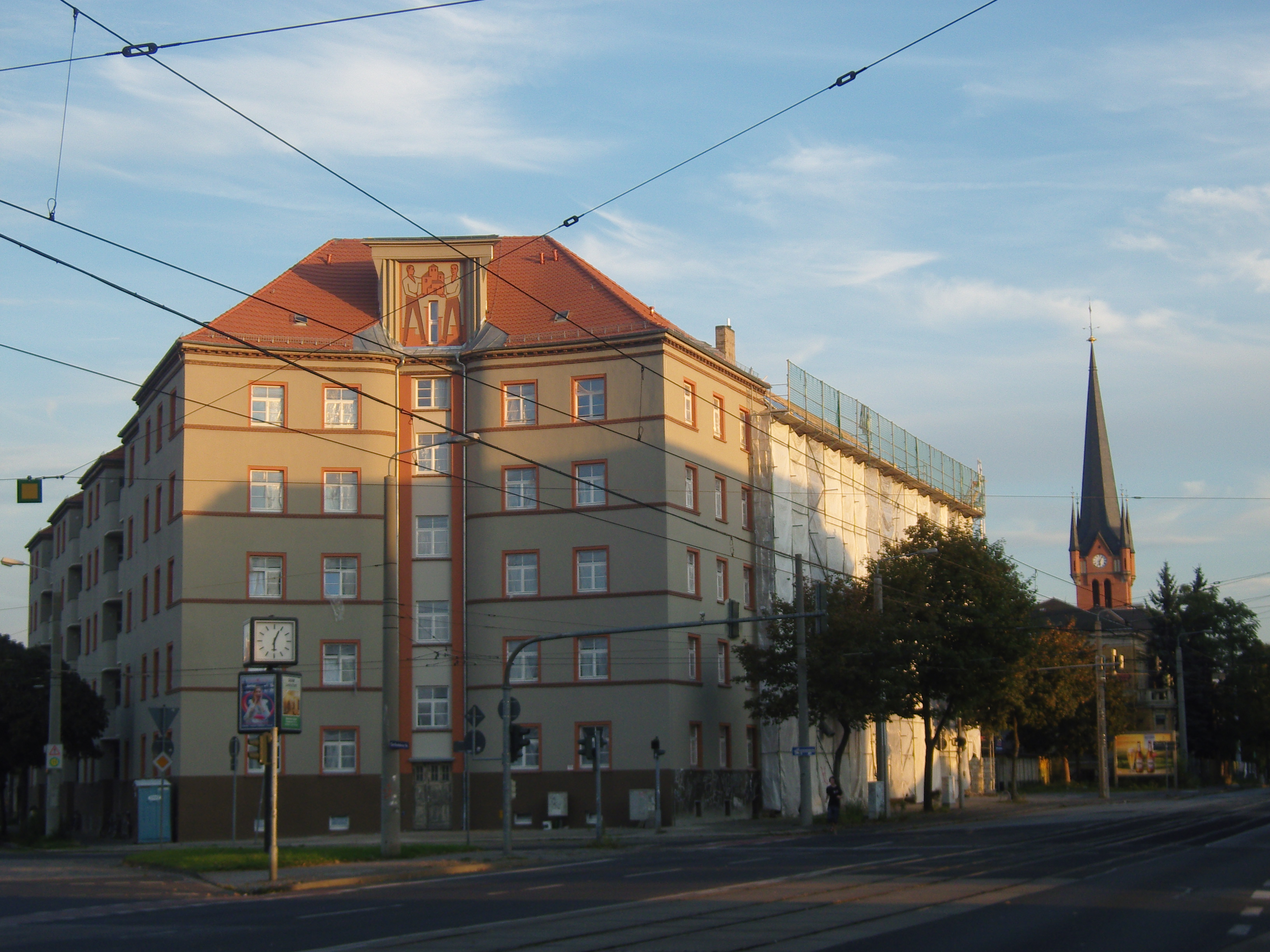 Denkmalgeschützte Wohnanlage Großenhainer Straße/Fritz-Reuter-Straße in Dresden, Ansicht von der Großenhainer Straße